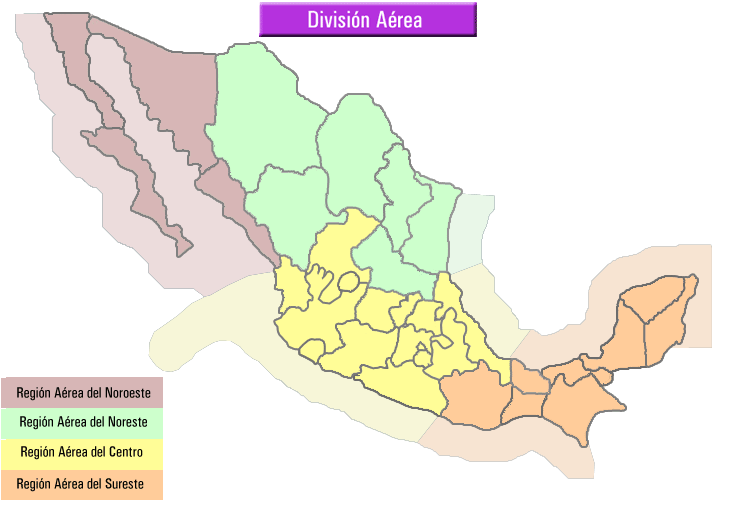 Division por areas del espacio aereo mexicano.